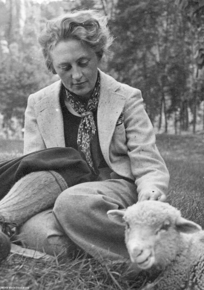 Vlasta Štáflová (1907 - 1945), Česká spisovatelka, publicistka a horolezkyně.